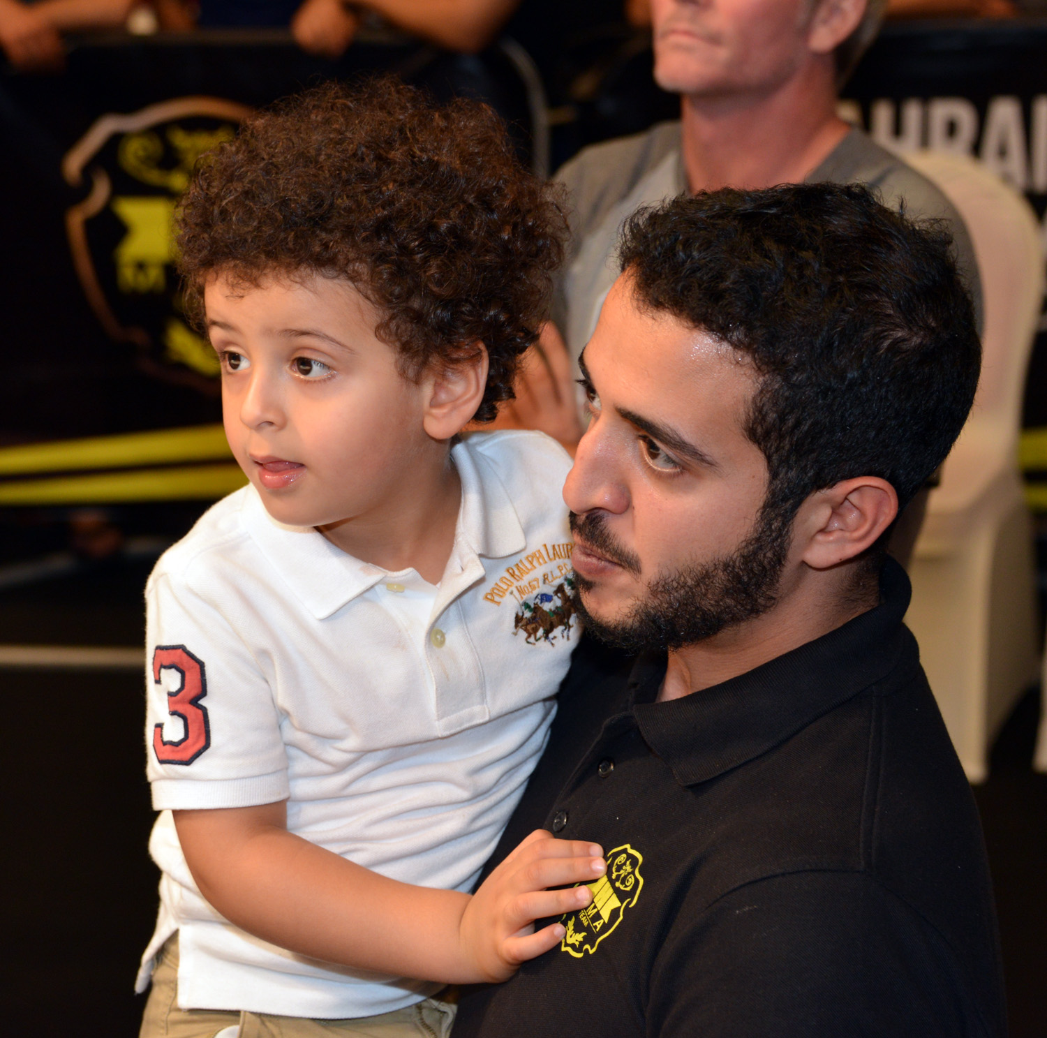 سموه مع نجله فيصل بن خالد بن حمد